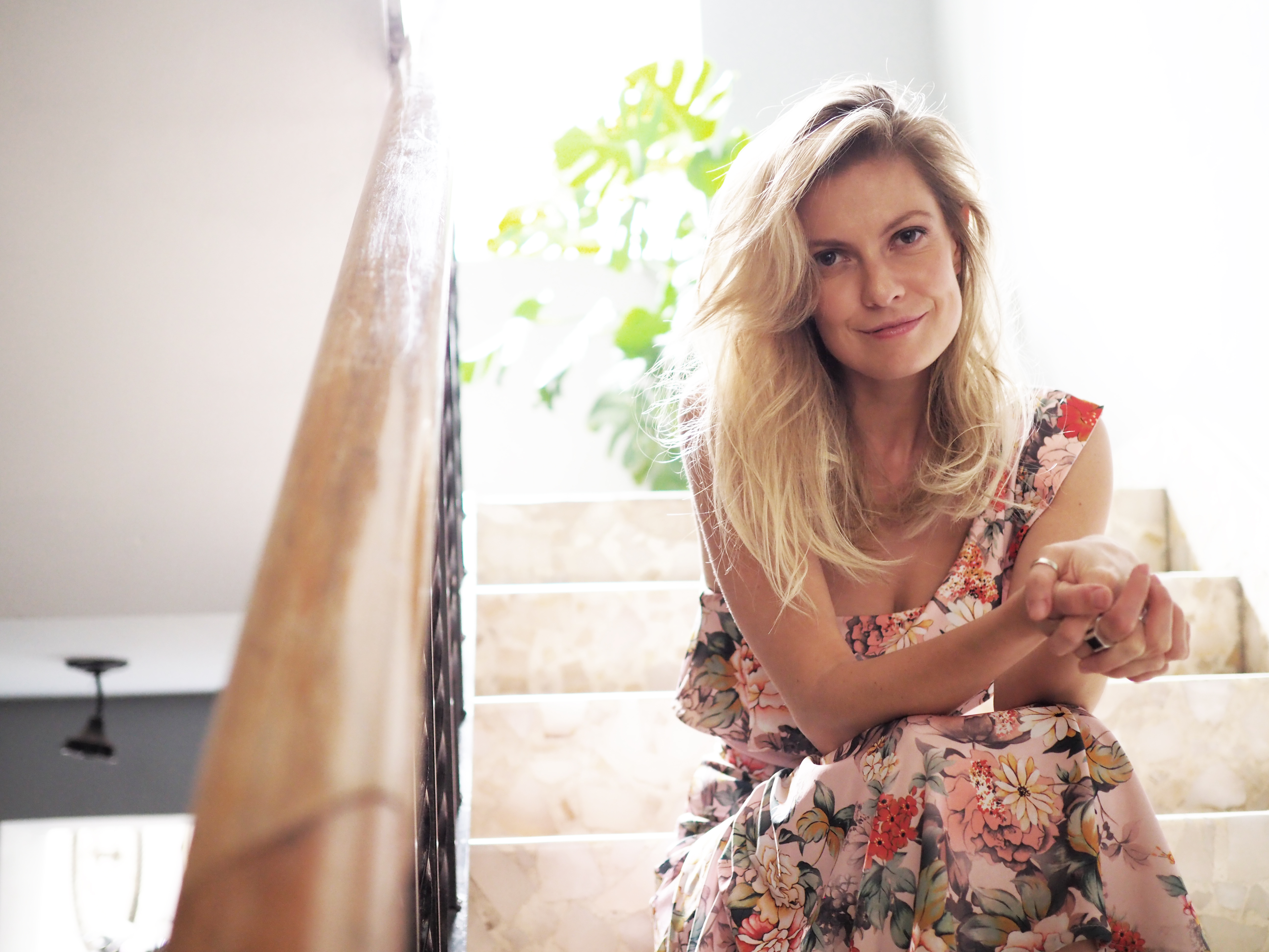 Ana Victoria García